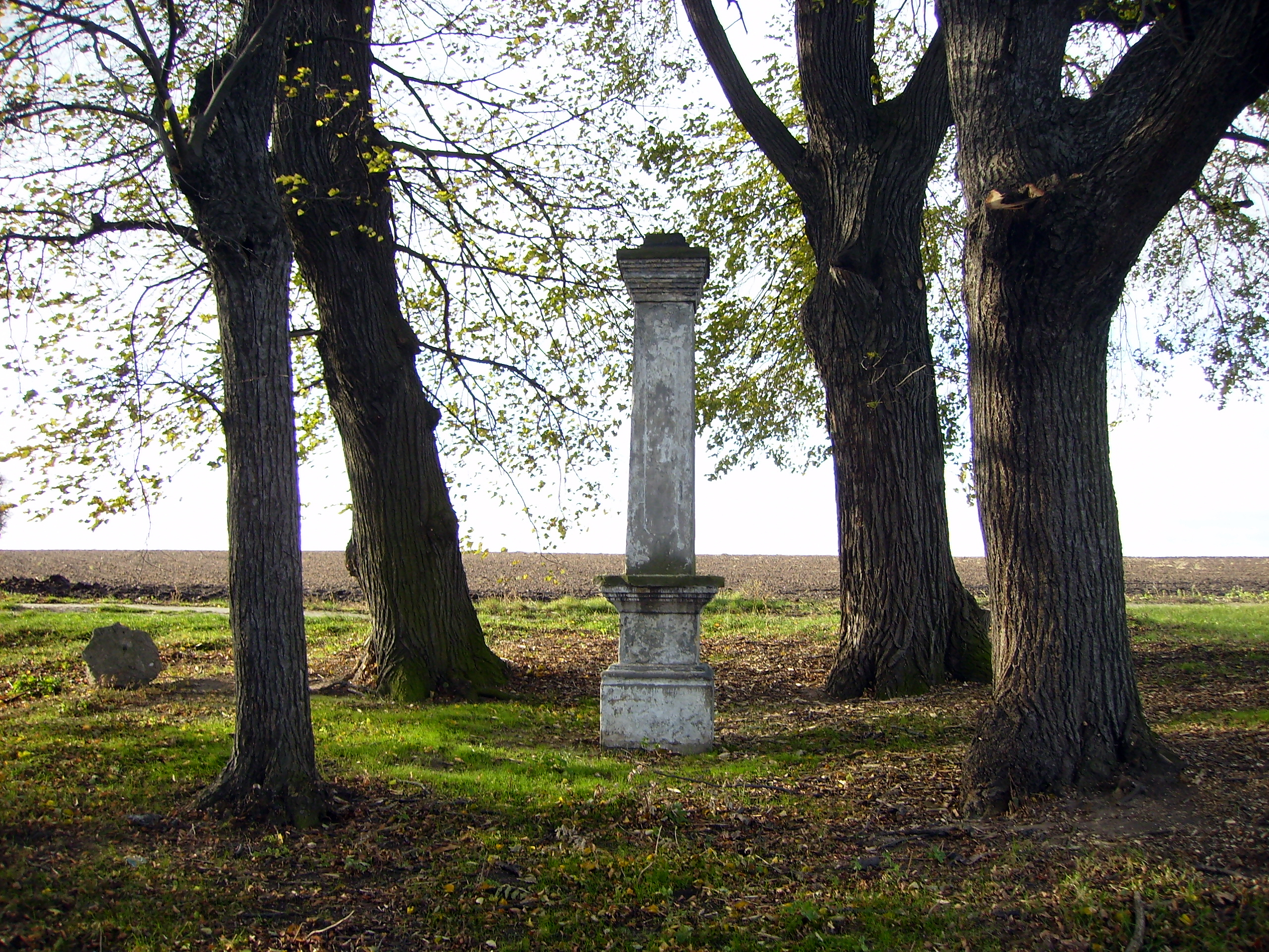 Památné lípy v Přerově nad Labem v lokalitě Na Vrších.